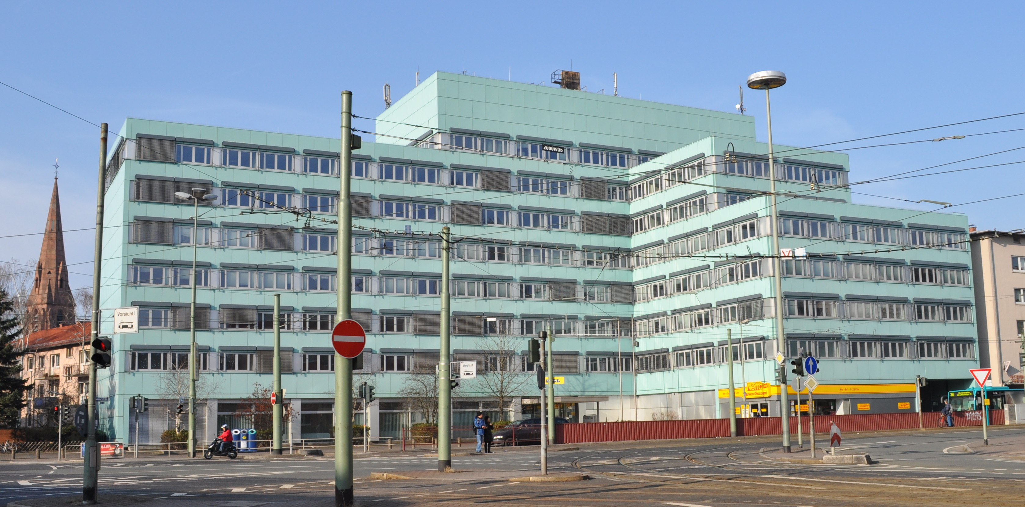 Bürogebäude Adalbertstraße 44-48 in Frankfurt am Main Bockenheim. Das Gebäude war bis 2006 Sitz des Verwaltungsgerichtes Frankfurt